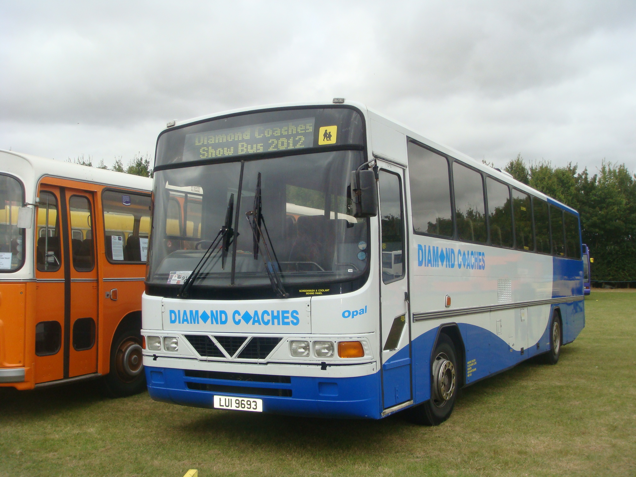 LUI 9693 Ulsterbus